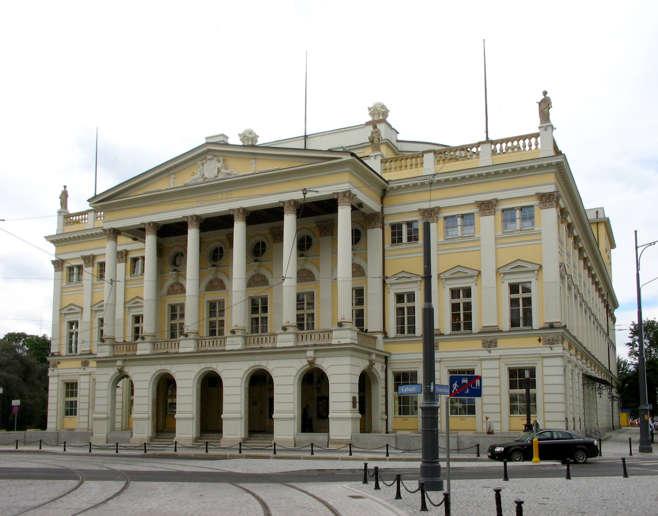 Wrocław - Opera Wrocławska przy ulicy Świdnickiej